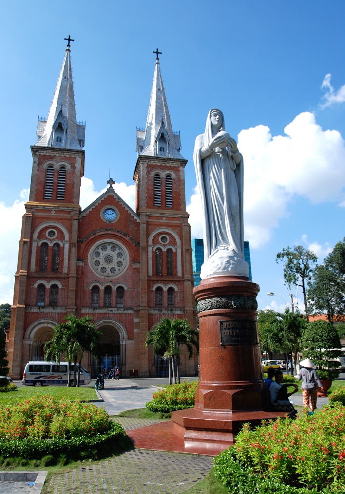 View 1